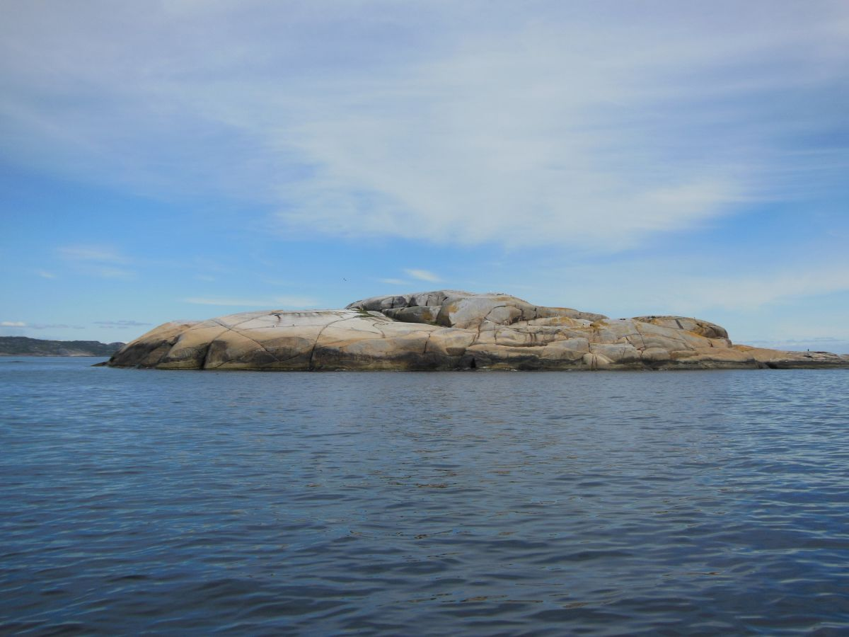 Den sørlige delen av Bølene fuglefredningsområde.